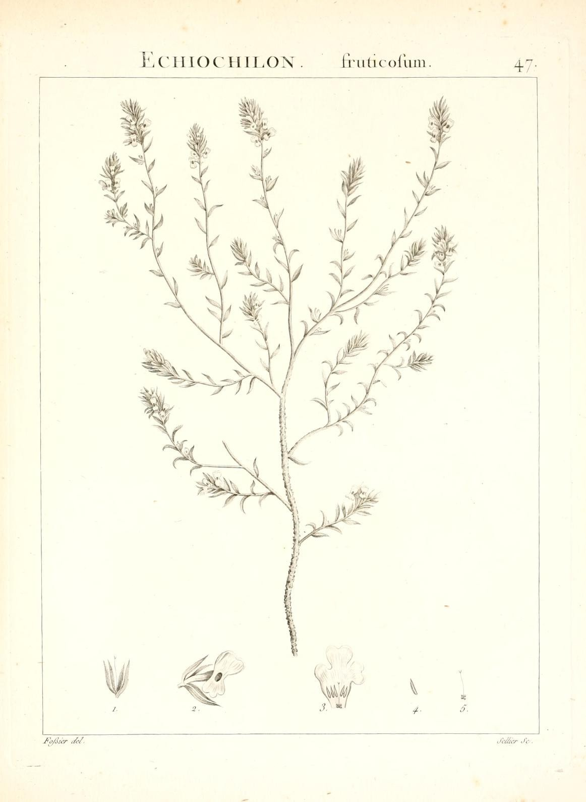 EcmOCHTLON. iiuticolum /'^o/Sicr i/e/. Jc//i'er ./(•